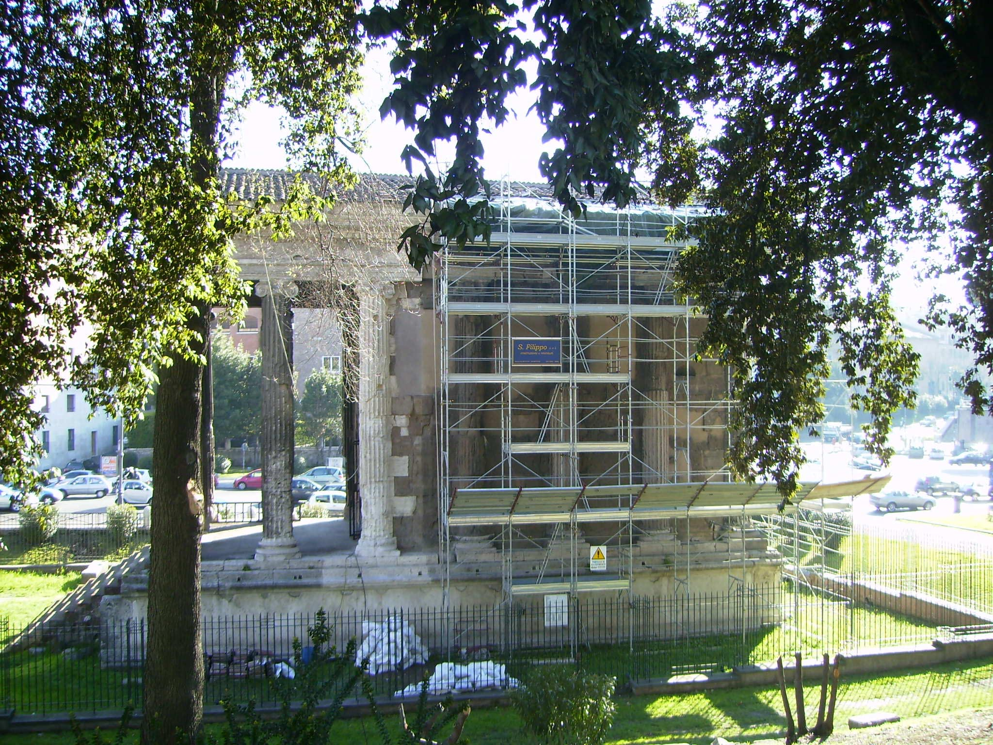 Façade est du temple de Portunus sur le forum Boarium avec les échafaudages de restauration lors des travaux de 2007 (Rome, Latium, Italie).